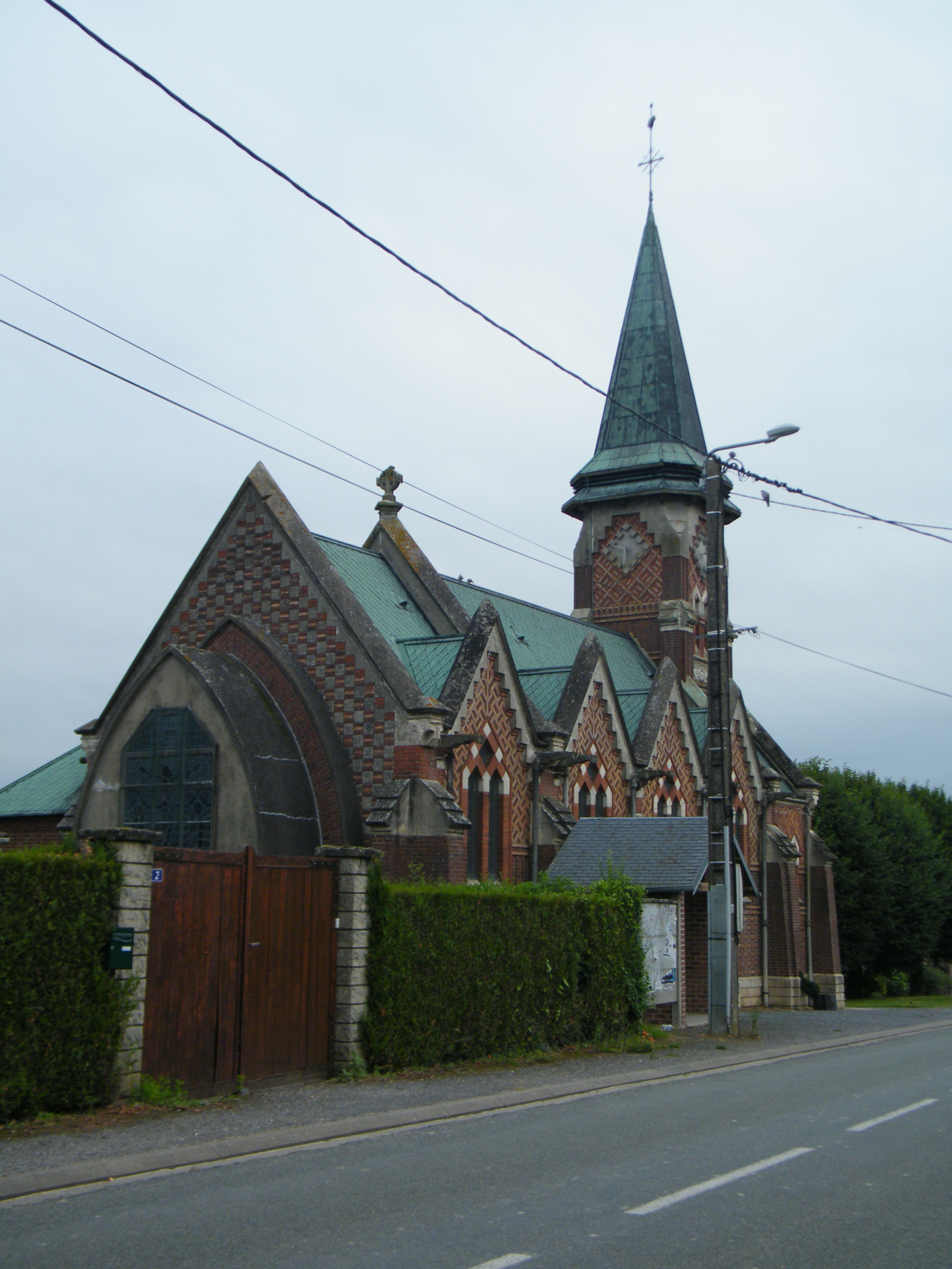 Eglise.